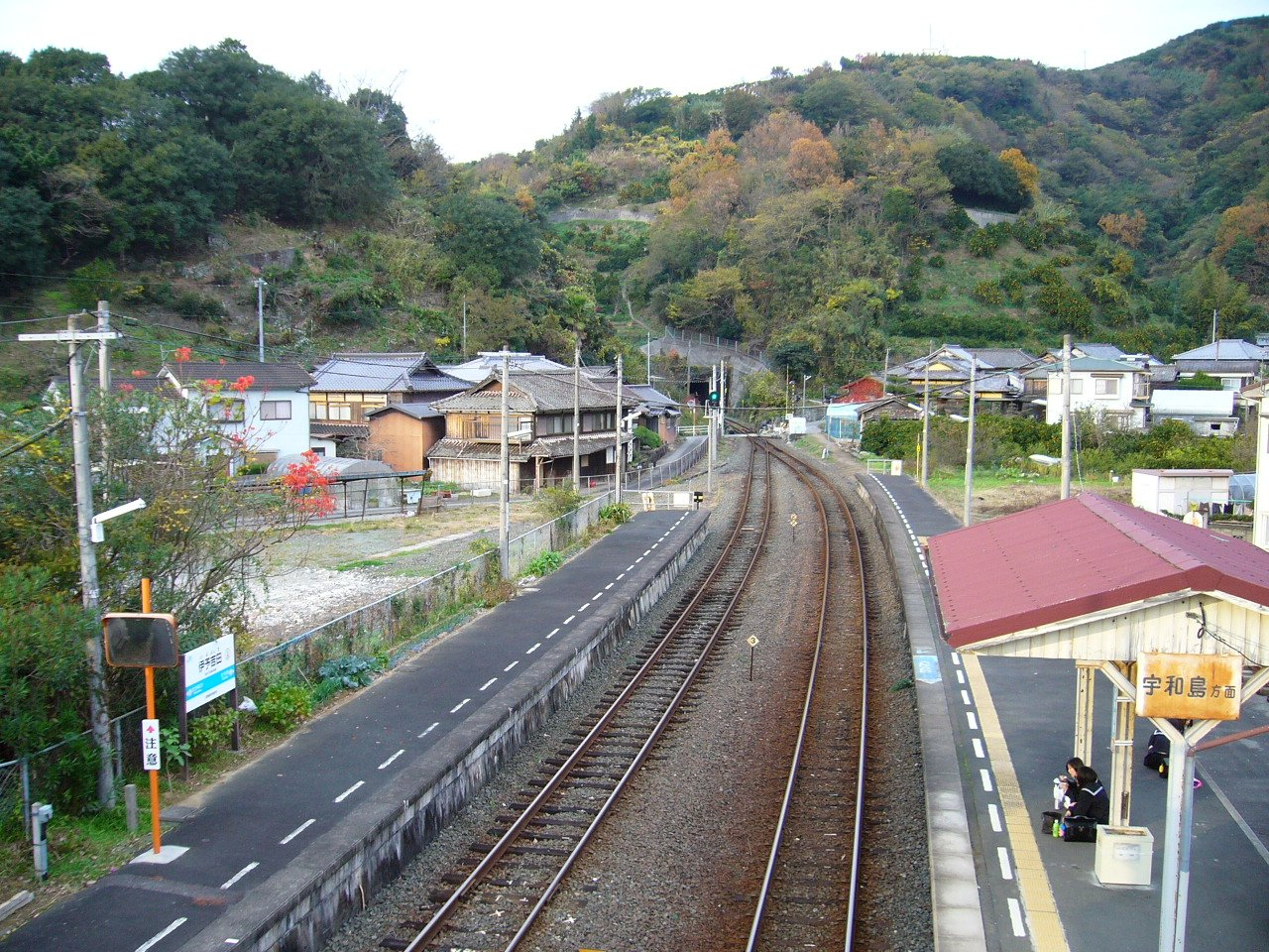 予讃線伊予吉田駅 駅構内